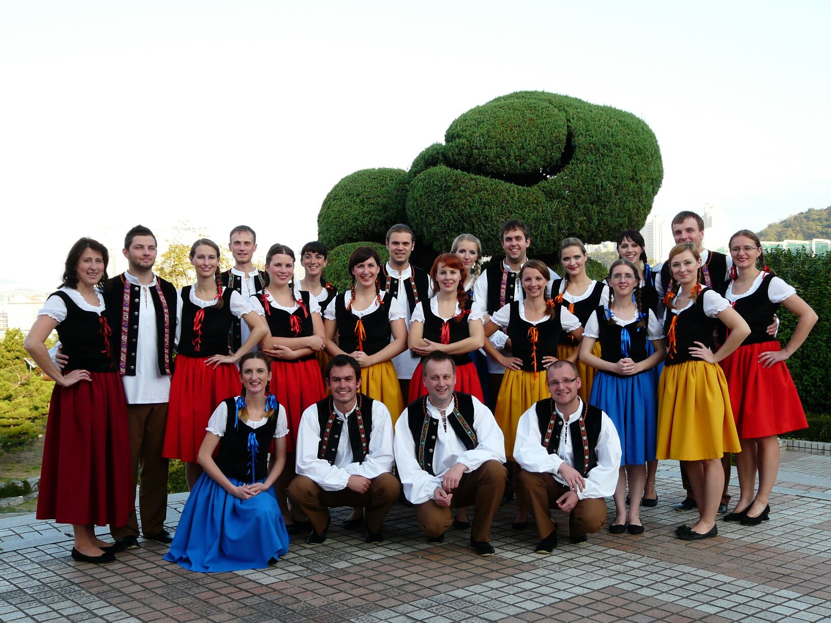 Pěvecký sbor IUVENTUS Svitavy - Jižní Korea